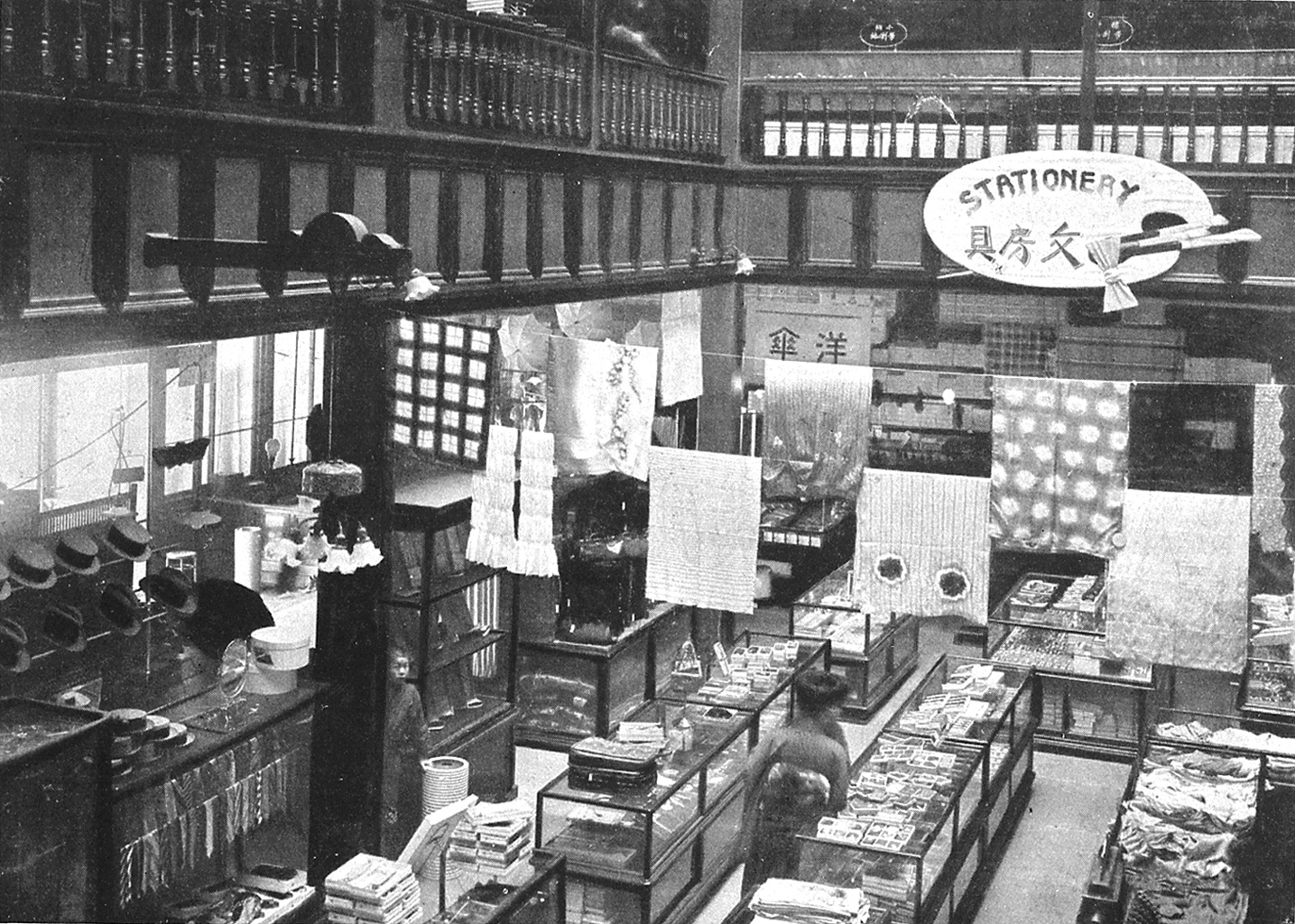 白木屋呉服店陳列場